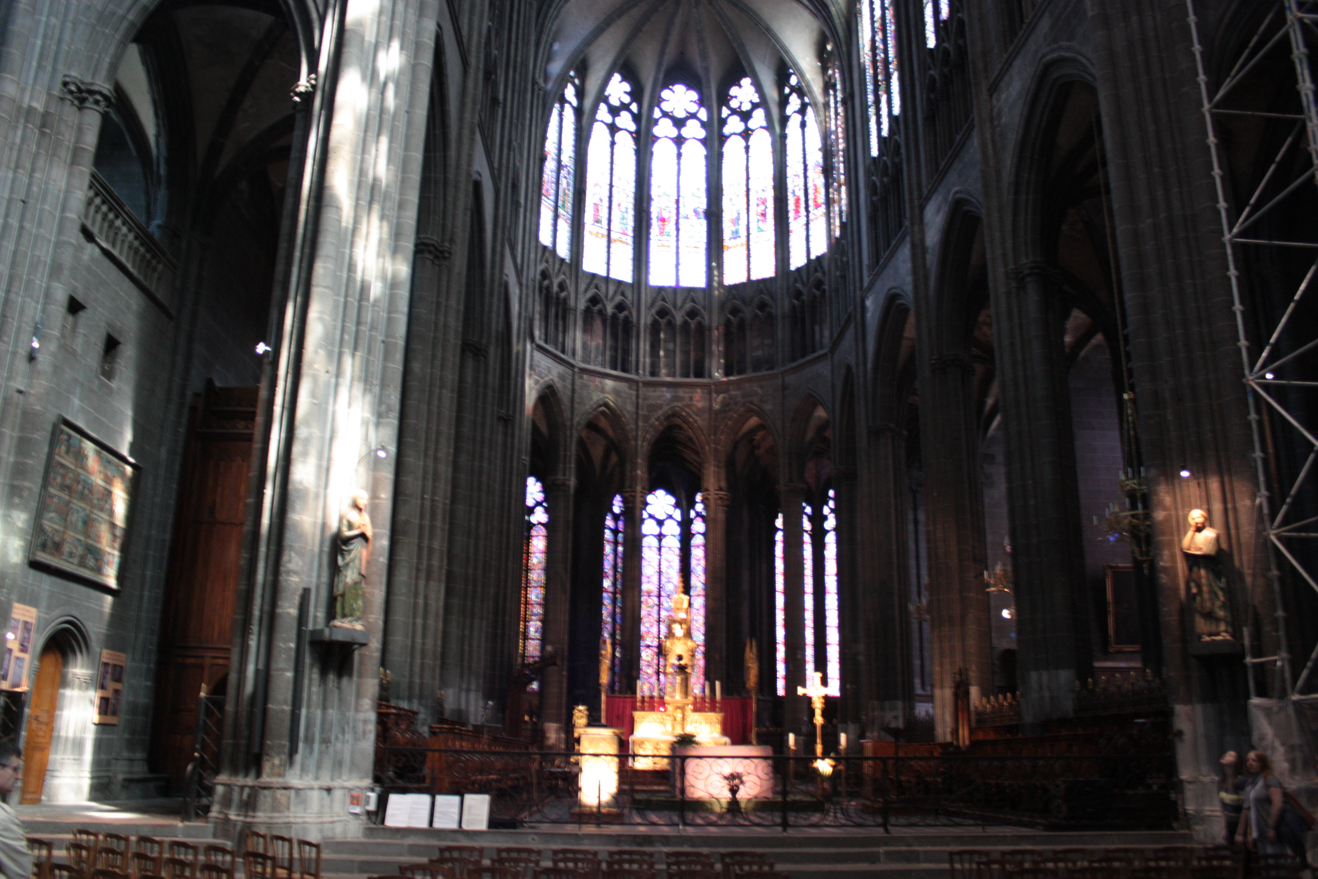 Choeur de la cathédrale de Clermont